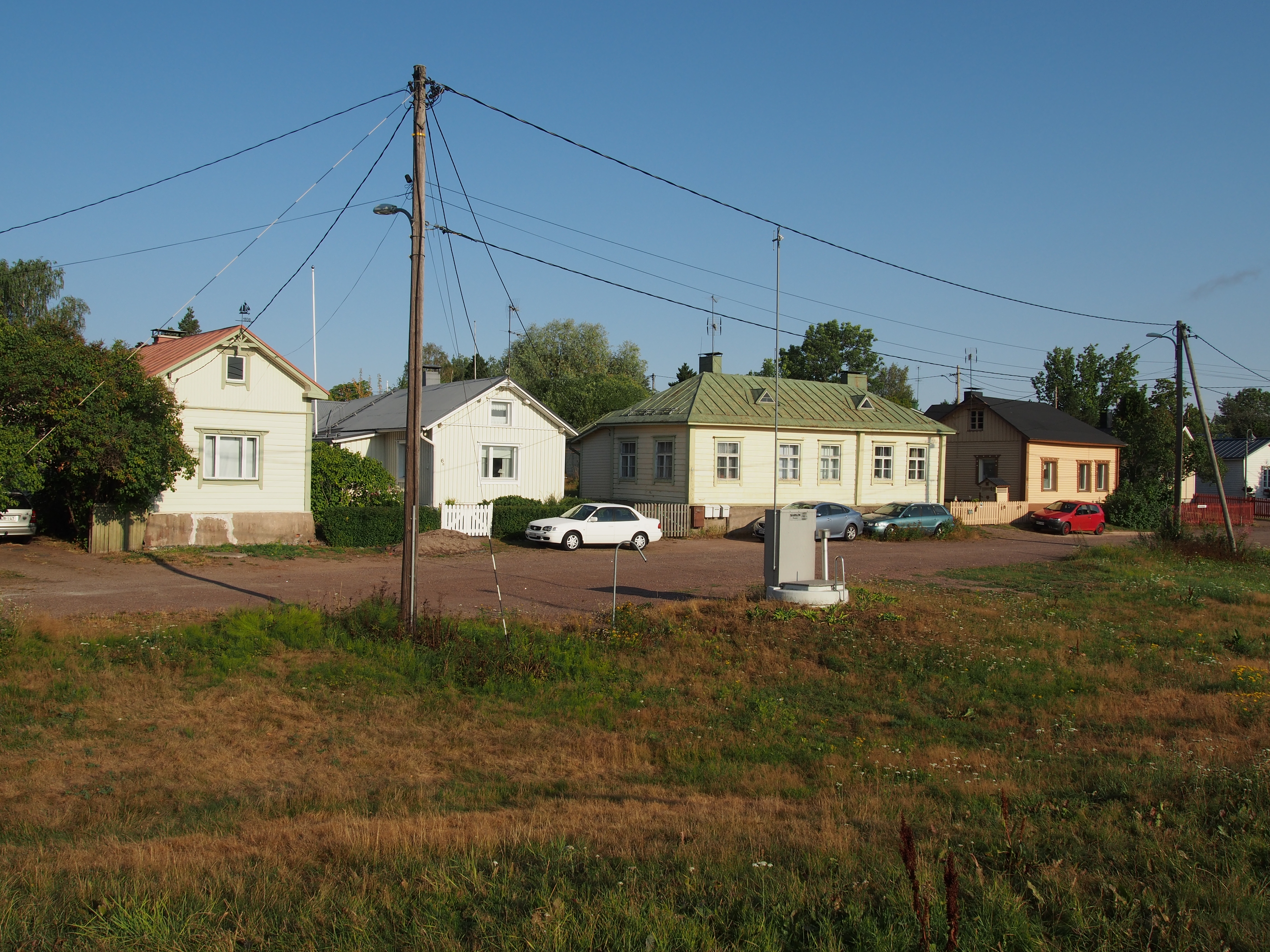 Näkymä Haminan Pitäjänsaaren kaupunginosasta.